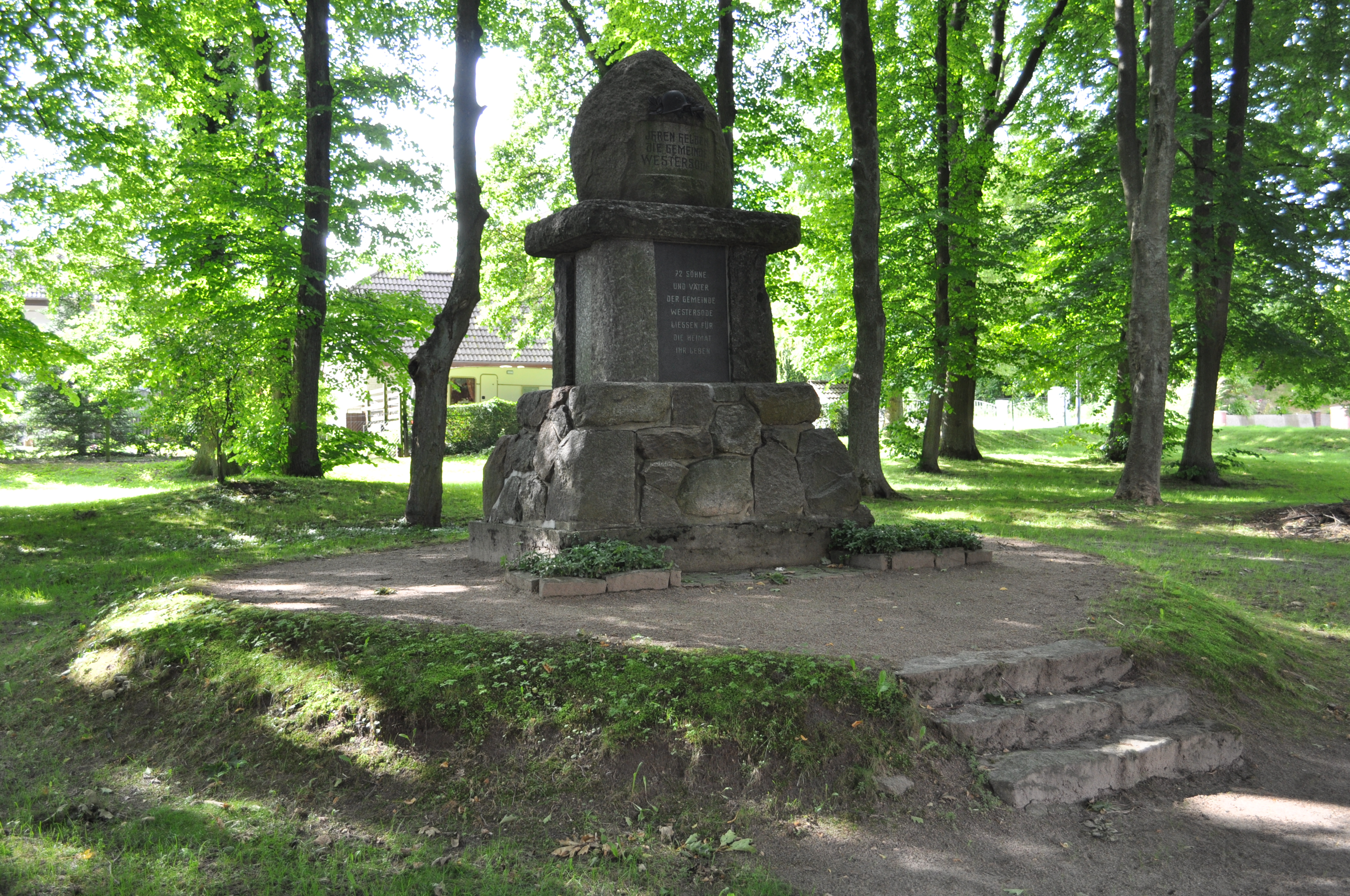 Denkmalanlage in Hemmoor-Westersode, Kriegerdenkmal 1914-18. This is a photograph of an architectural monument. .202.200.004